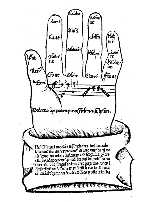 La main harmonique de Guido d'Arezzo, extrait du Sacerdotale Juxta S.Romanae Ecclesiae, Publié par Petri Rabani, Venise 1554